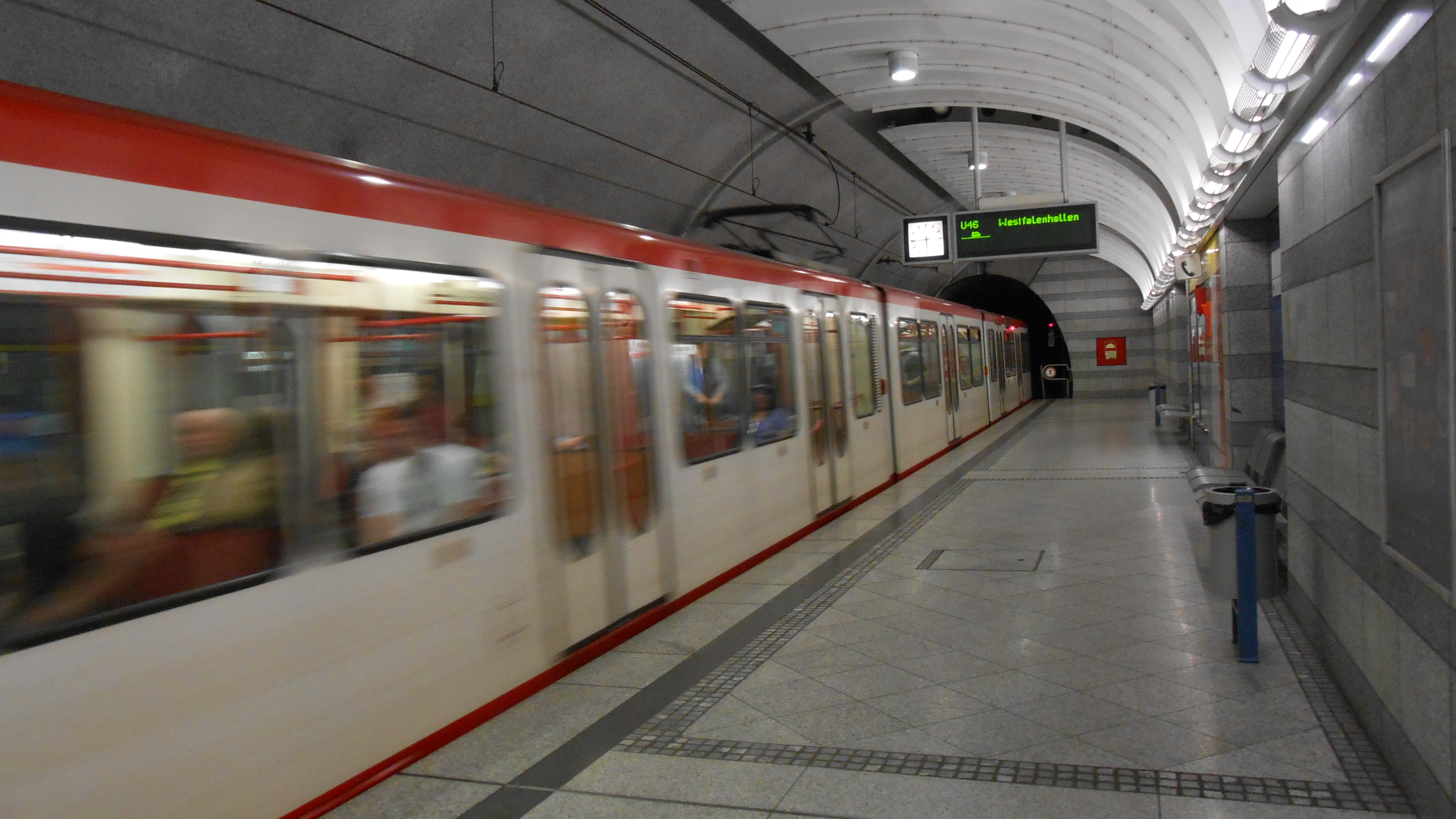 Einfahrt Stadtbahn der Linie U46 in den U-Bahnhof Saarlandstraße, Richtung Westfalenhallen.